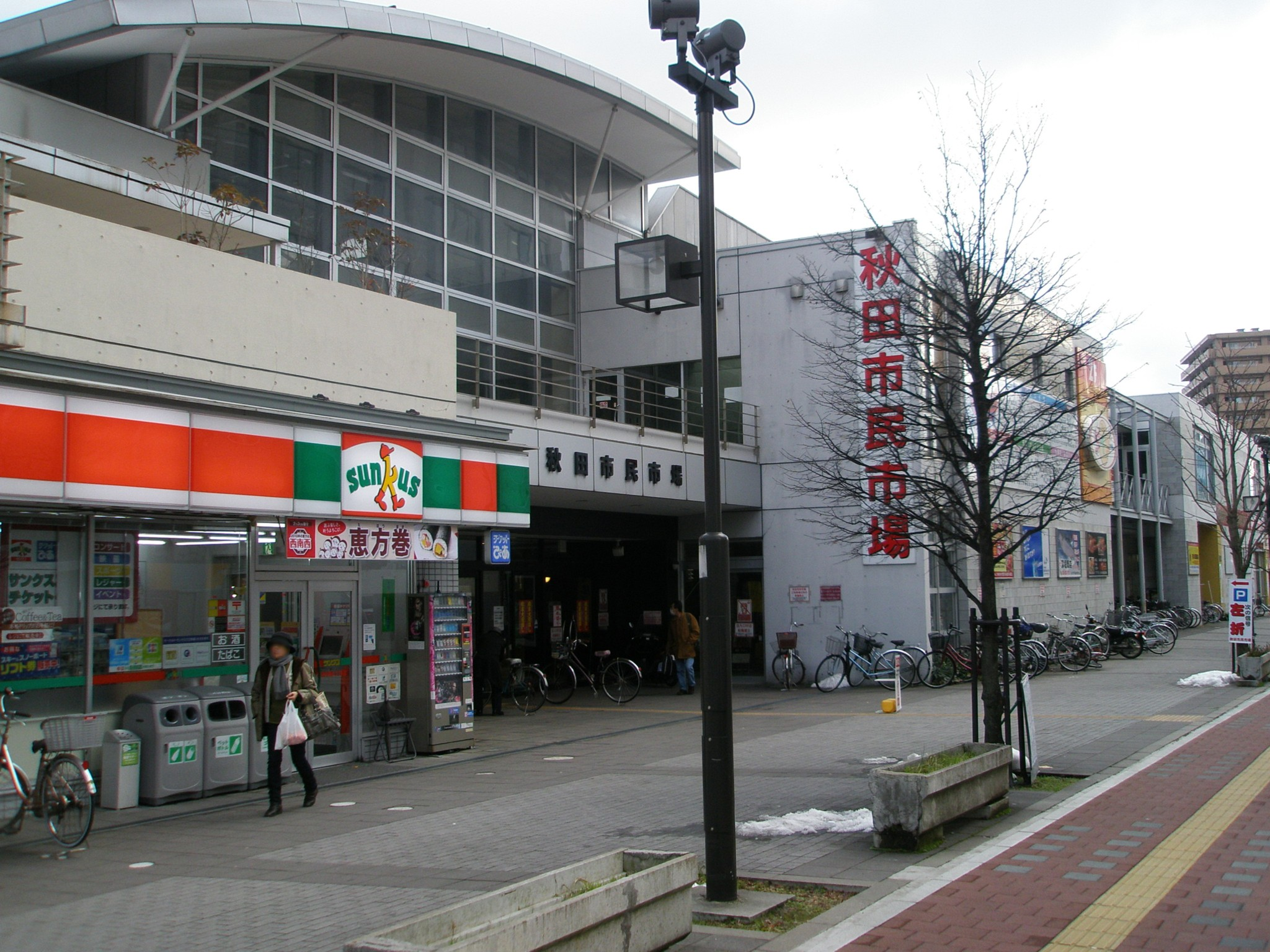 秋田市民市場